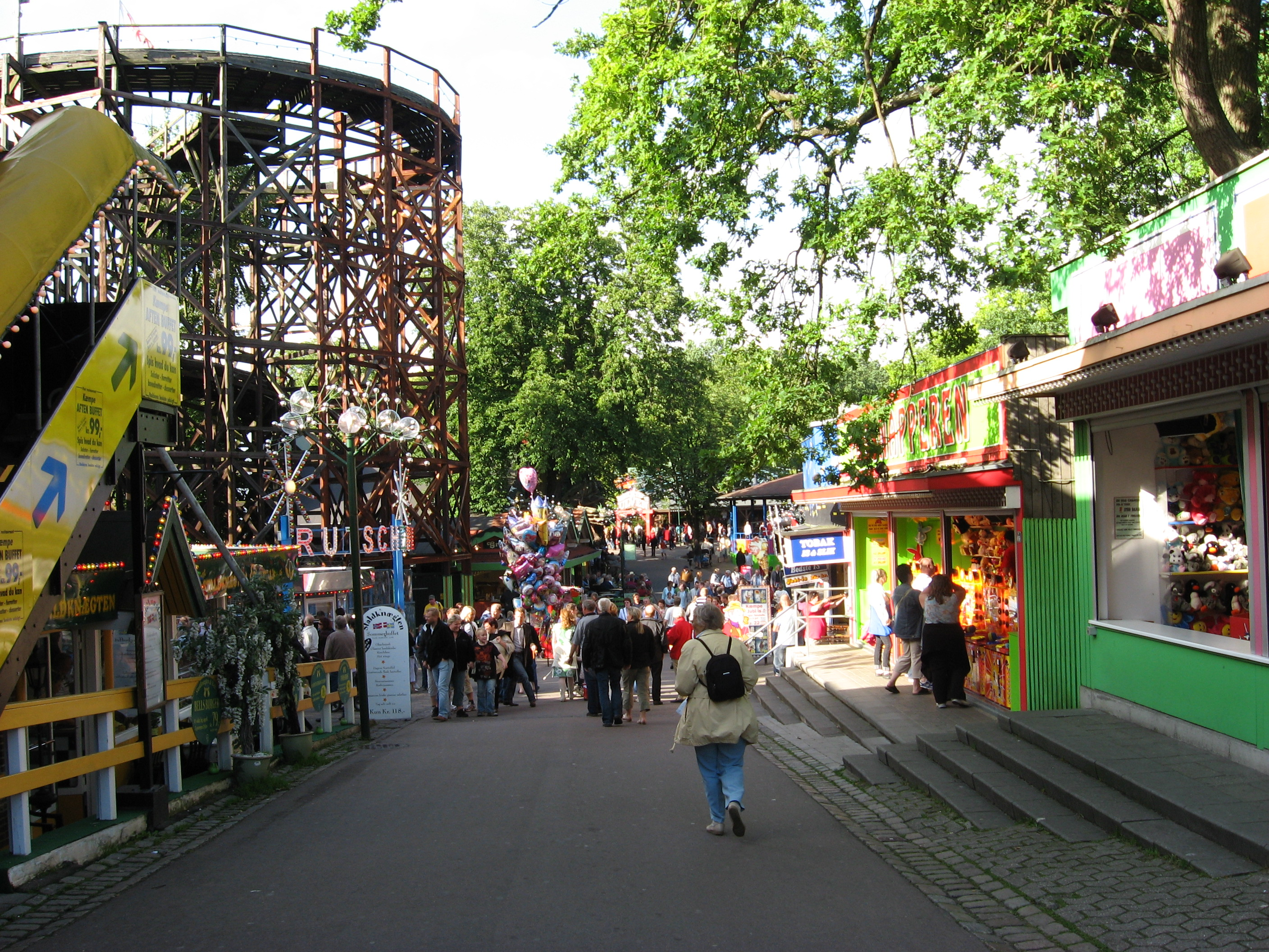 Dyrehavsbakken, or just Bakken, an amusement park in Denmark.